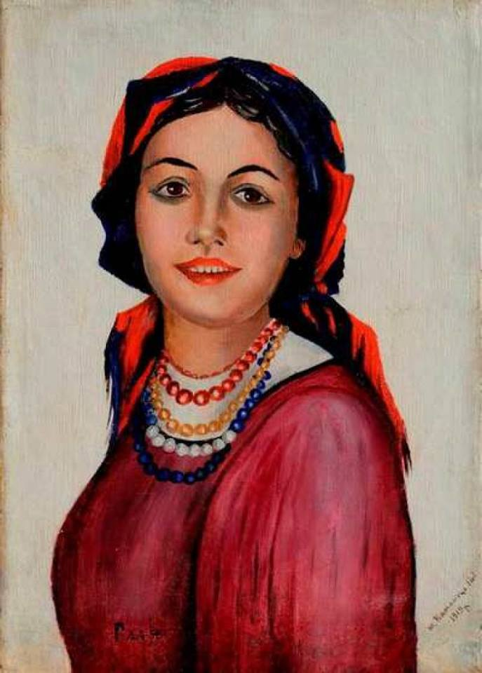 Володимир Гагенмейстер. Портрет дружини Нестора Махна Галини Кузьменко, 1919